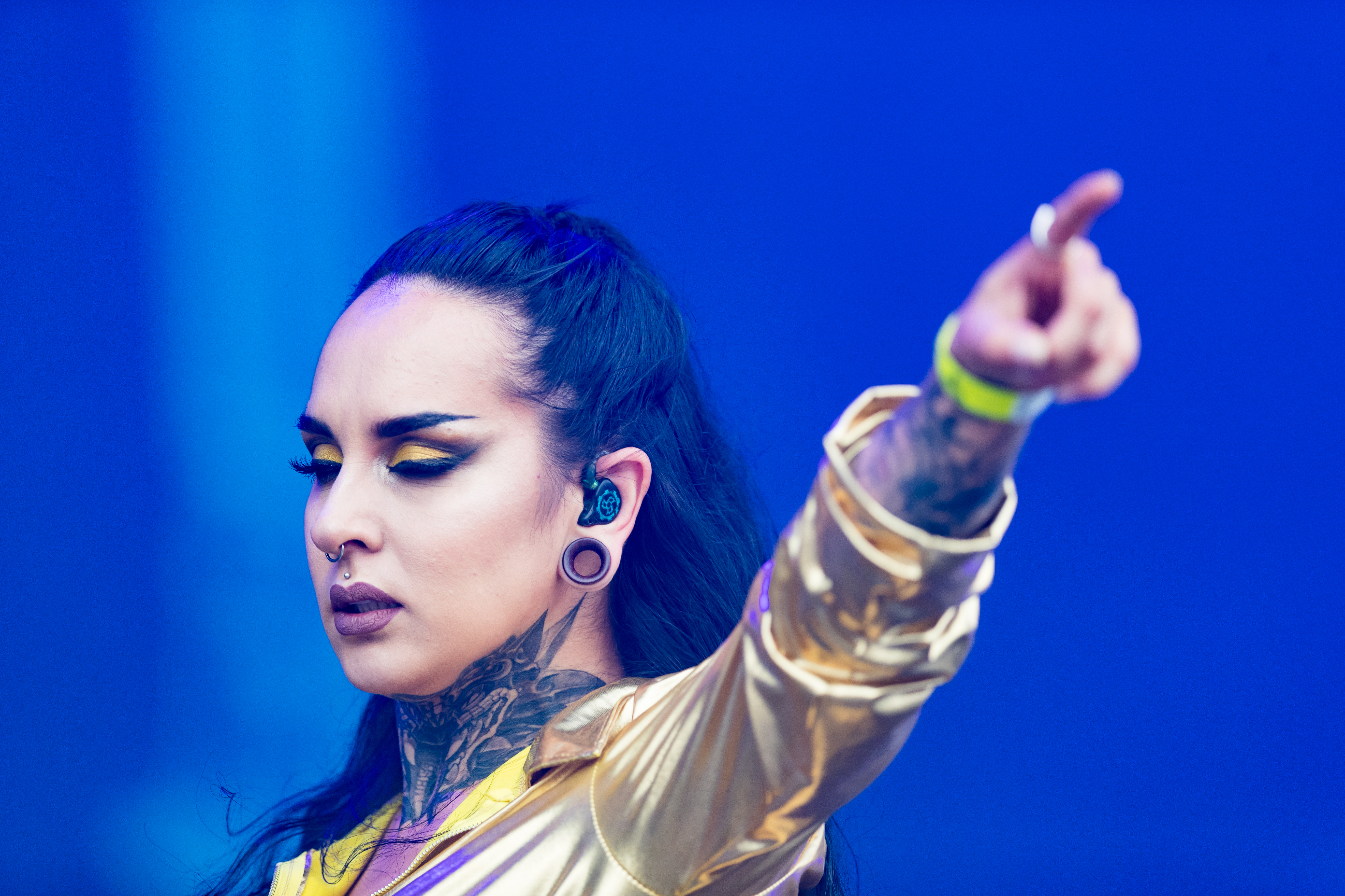 Jinjer during Wacken Open Air at The Holy Wacken Land, Wacken, Schleswig-Holstein, Germany on 2019-08-02, Photo: Sven Mandel